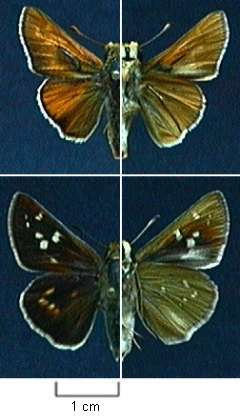 Hesperia leonardus pawnee